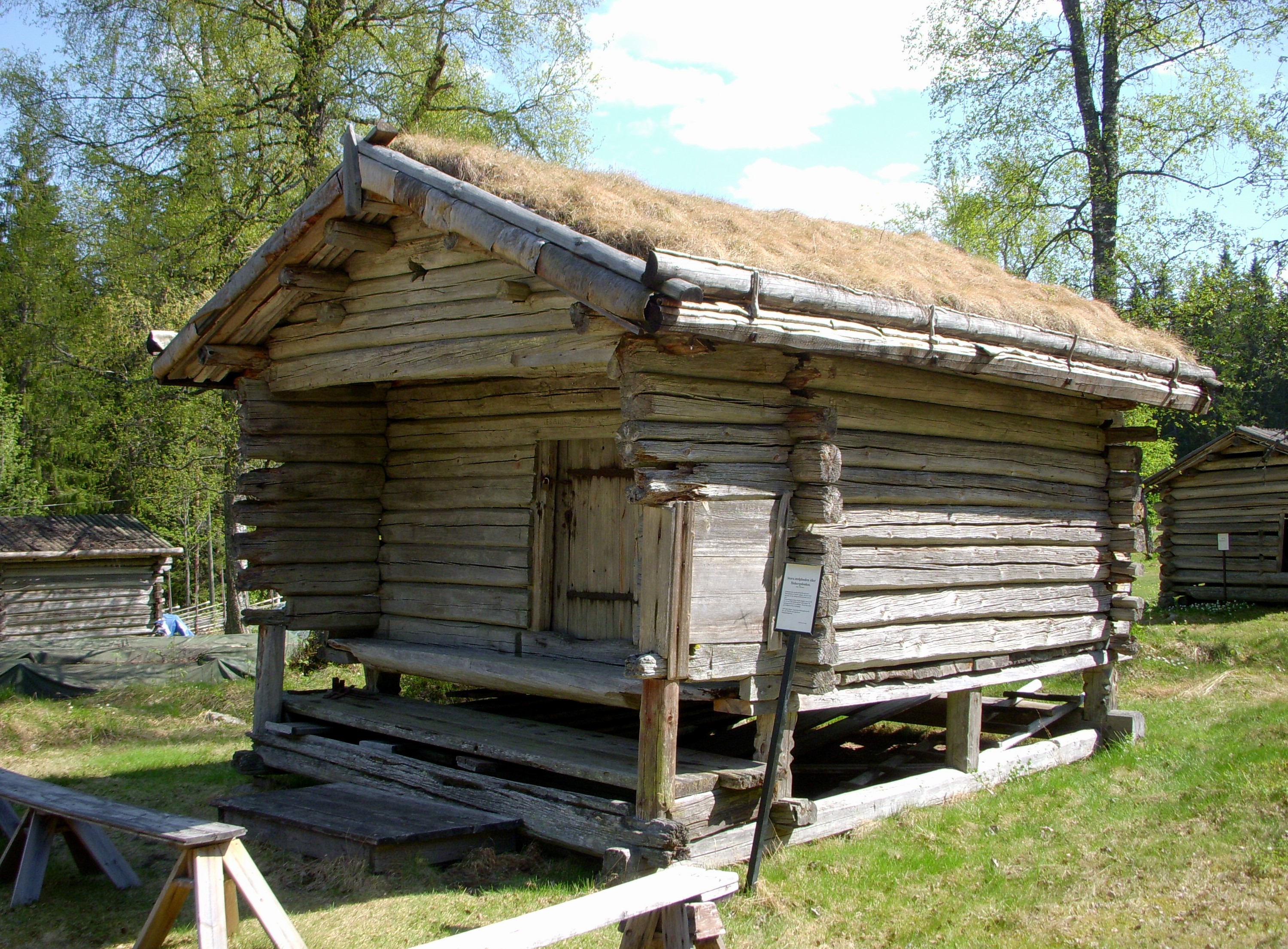 Finngammelgården vid Skattlösberg i Dalarna, "Stolpboden"